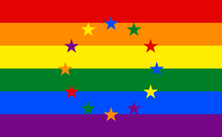 Bandera gay Unión Europea